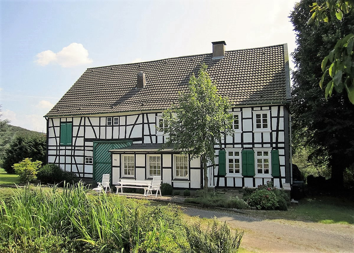 Denkmalgeschützter Lindenhof im Hattinger Stadtteil Oberelfringhausen, Felderbachstraße 91. Der ehemalige Bauernhof wurde erstmals im Jahre 1005 als „Diie Lynde, up ter Lynden“ erwähnt. 1534 war Herman up der Liinden einer der 19 freien Königshofbauern des Reichshofes Hattingen. Die ursprüngliche Grundstücksgröße betrug früher mehr als 200 Morgen, außerdem gehörten zum Lindenhof eine Reihe von Kotten, die aber im 19. Jahrhundert durch Heirat oder Verkauf abgingen. Ende der 1960er Jahre wurde die Landwirtschaft aufgegeben. Das um 1780 erbaute Fachwerkhaus war bis 1919 in Besitz der Familie Lindermann, danach Familie Ströter, ab 1925 Familie Meiwes und heute in der Nachfolge Familie Pohlmann. This is a photograph of an architectural monument.